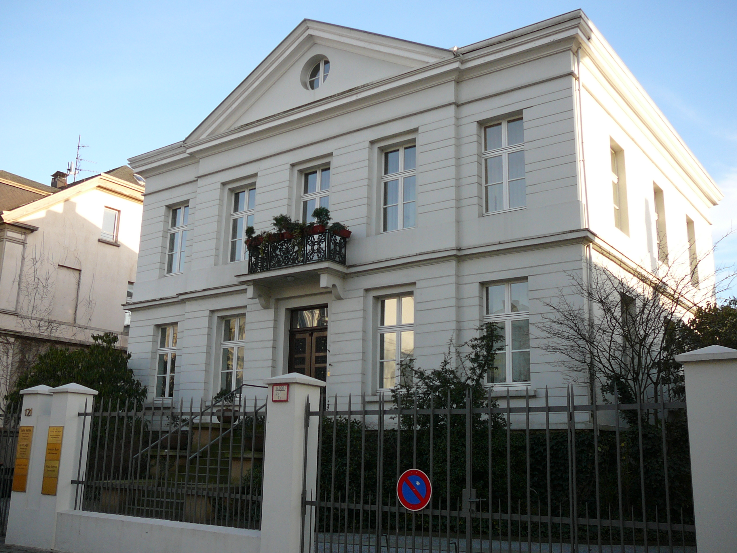 Friedrich-Ebert-Str., Wuppertal